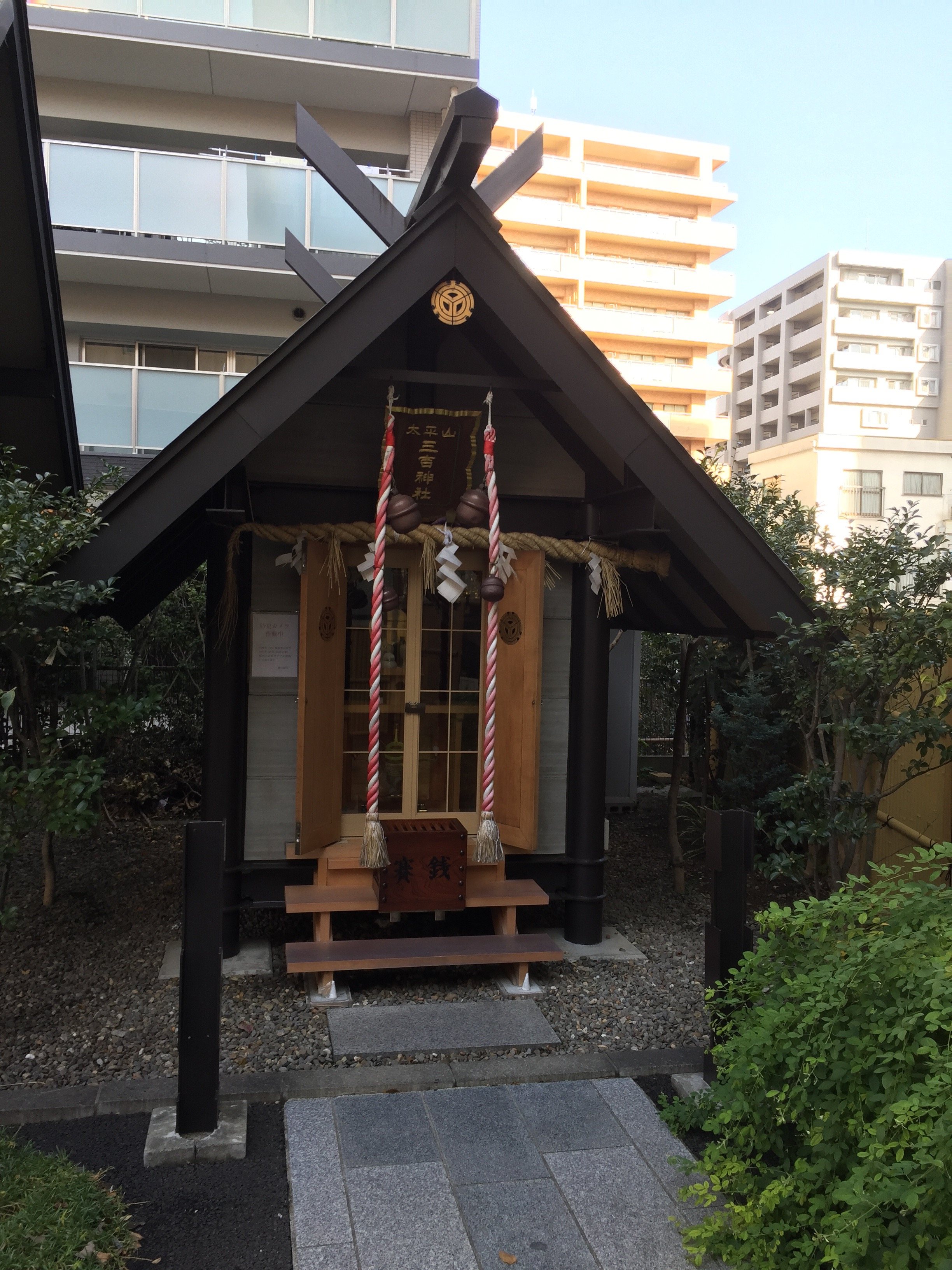 仙台駅東口の初恋通りにある三吉神社